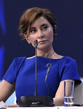 Модератор дискуссии Софико Шеварднадзе на пленарном заседании Петербургского международного экономического форума.